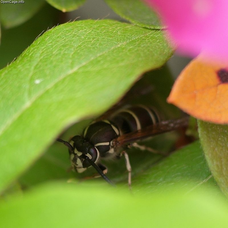 クロスズメバチ Vespula flaviceps クロスズメバチは、スズメバチ科・スズメバチ亜科クロスズメバチ属に属するハチ Location 神戸市西区 Copyright OpenCage